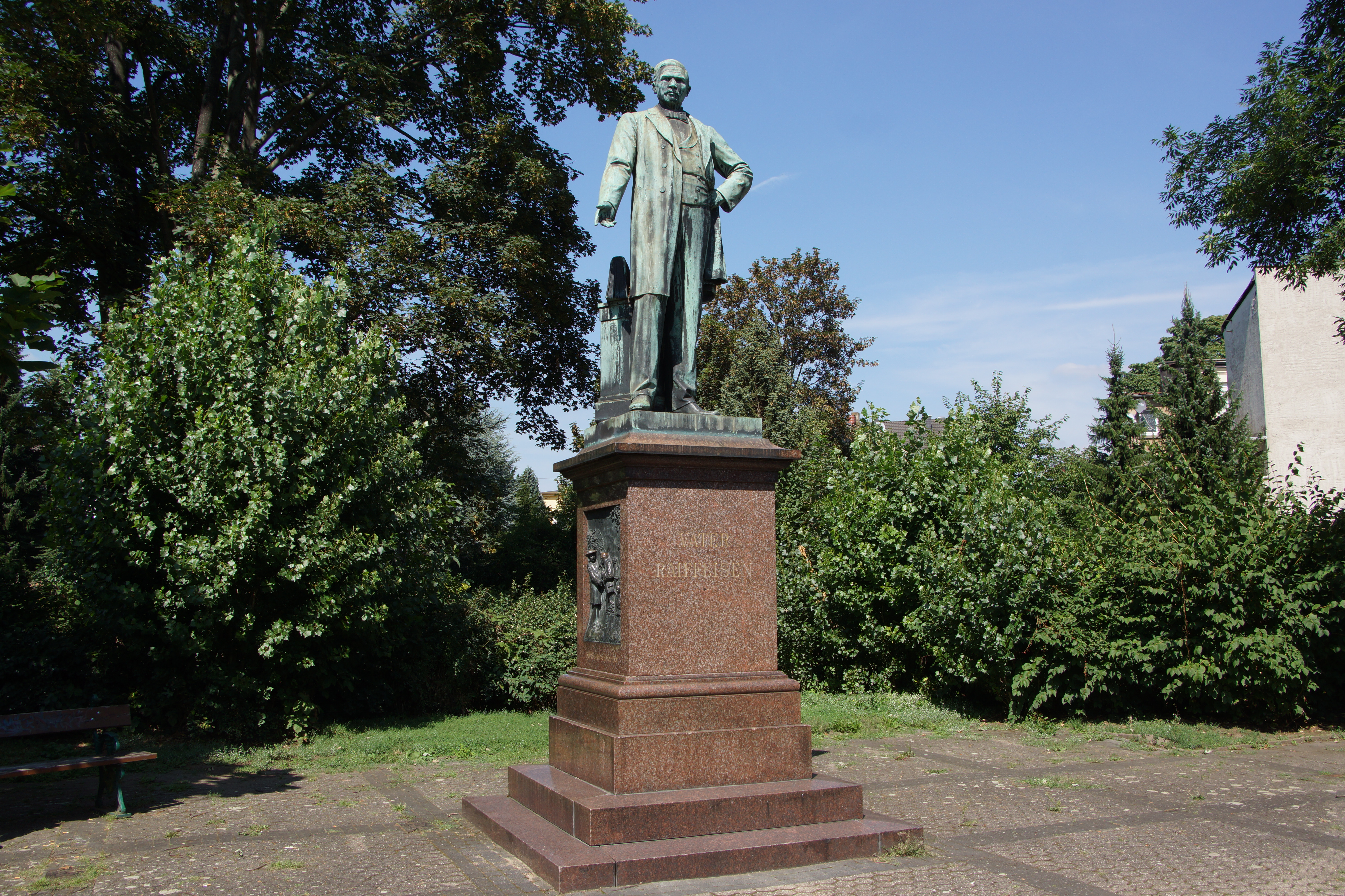 Raiffeisendenkmal Neuwied